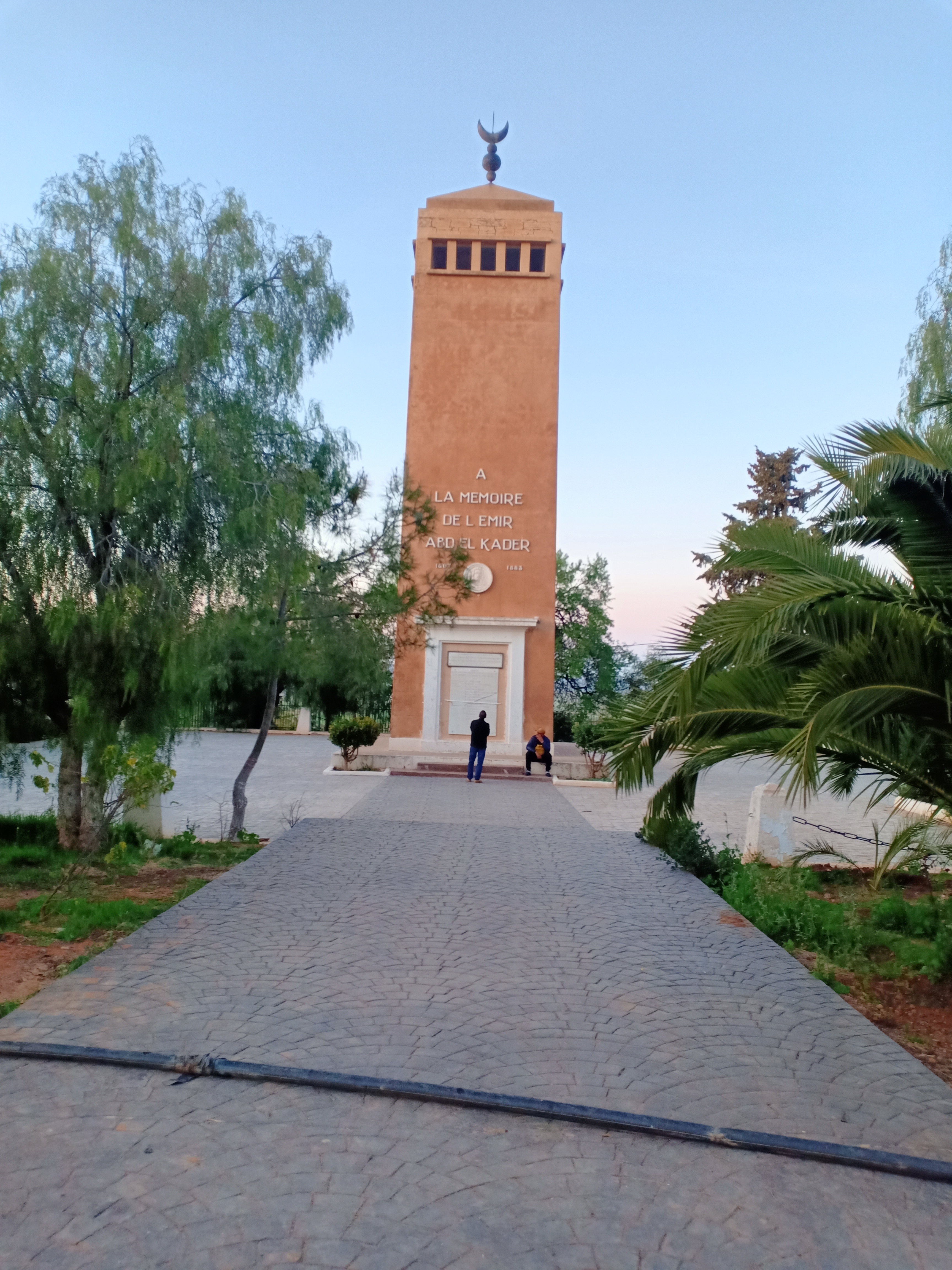 A la mémoire de l'Emir Abd el Kader (1807-1883) ce monument a été inauguré le 15 octobre 1945